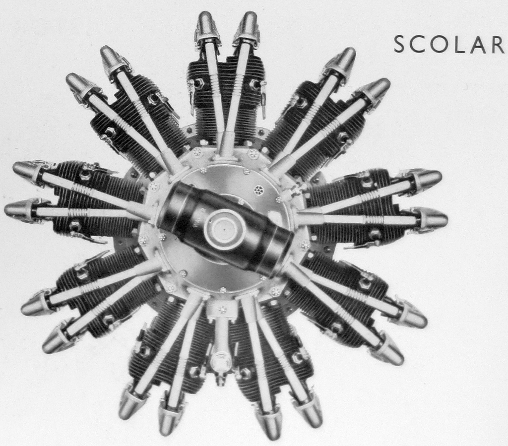 letecký motor Walter Scolar (1936)